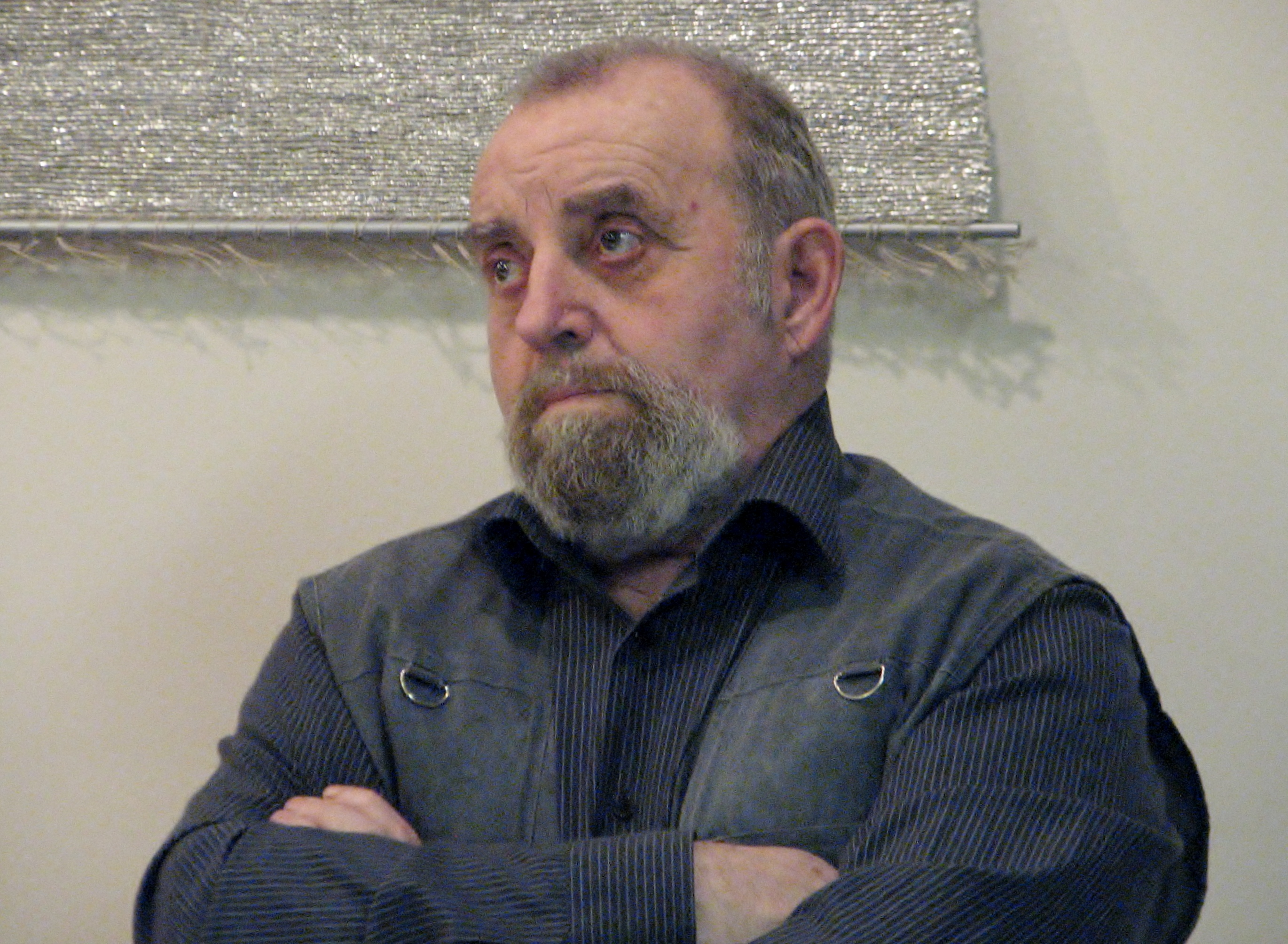 Andrei Anissimov Tallinna Keskraamatukogu võõrkeelse kirjanduse osakonnas